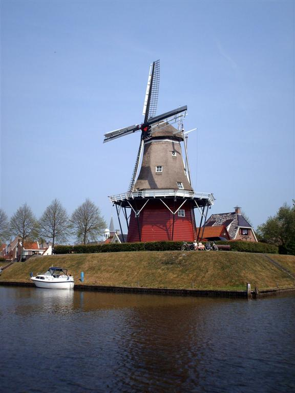 De Hoop, molen te Dokkum